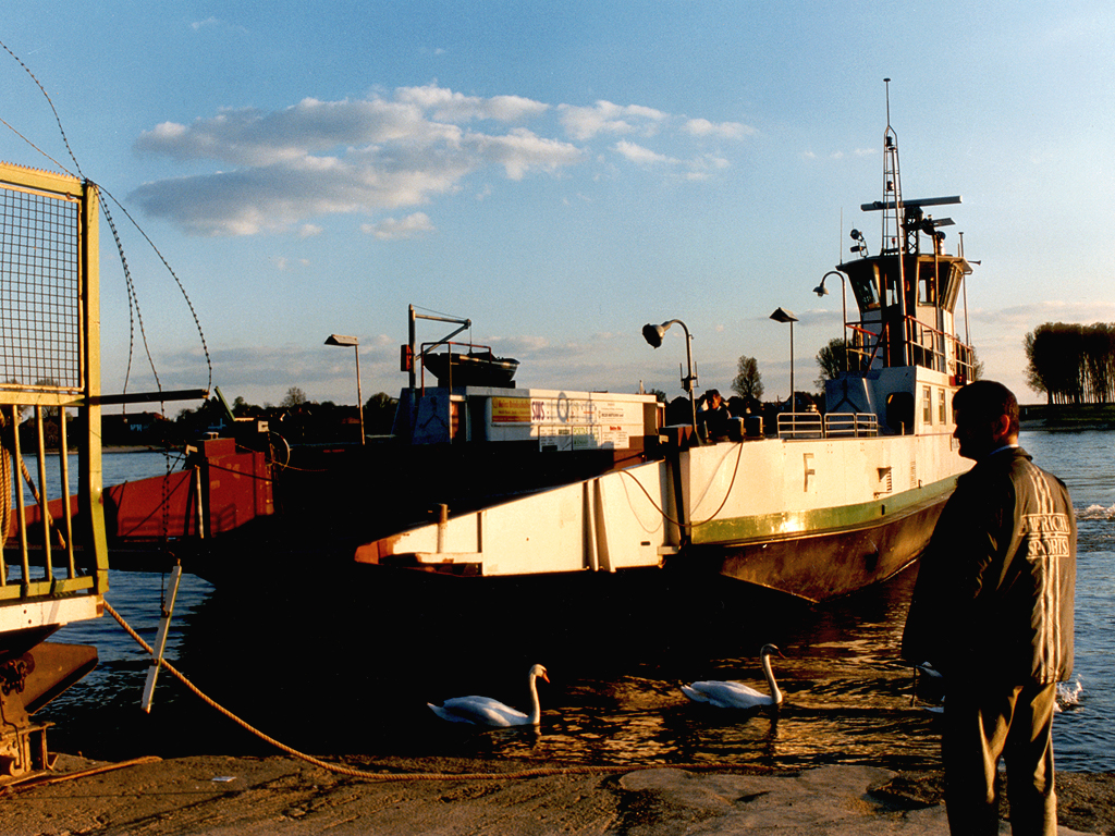 Faehre Leverkusen-Hitdorf